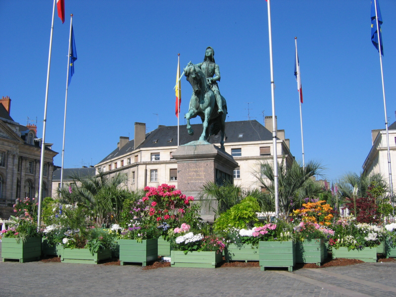 Standbild der Jean d'Arc, Orleans, Frankreich 2004